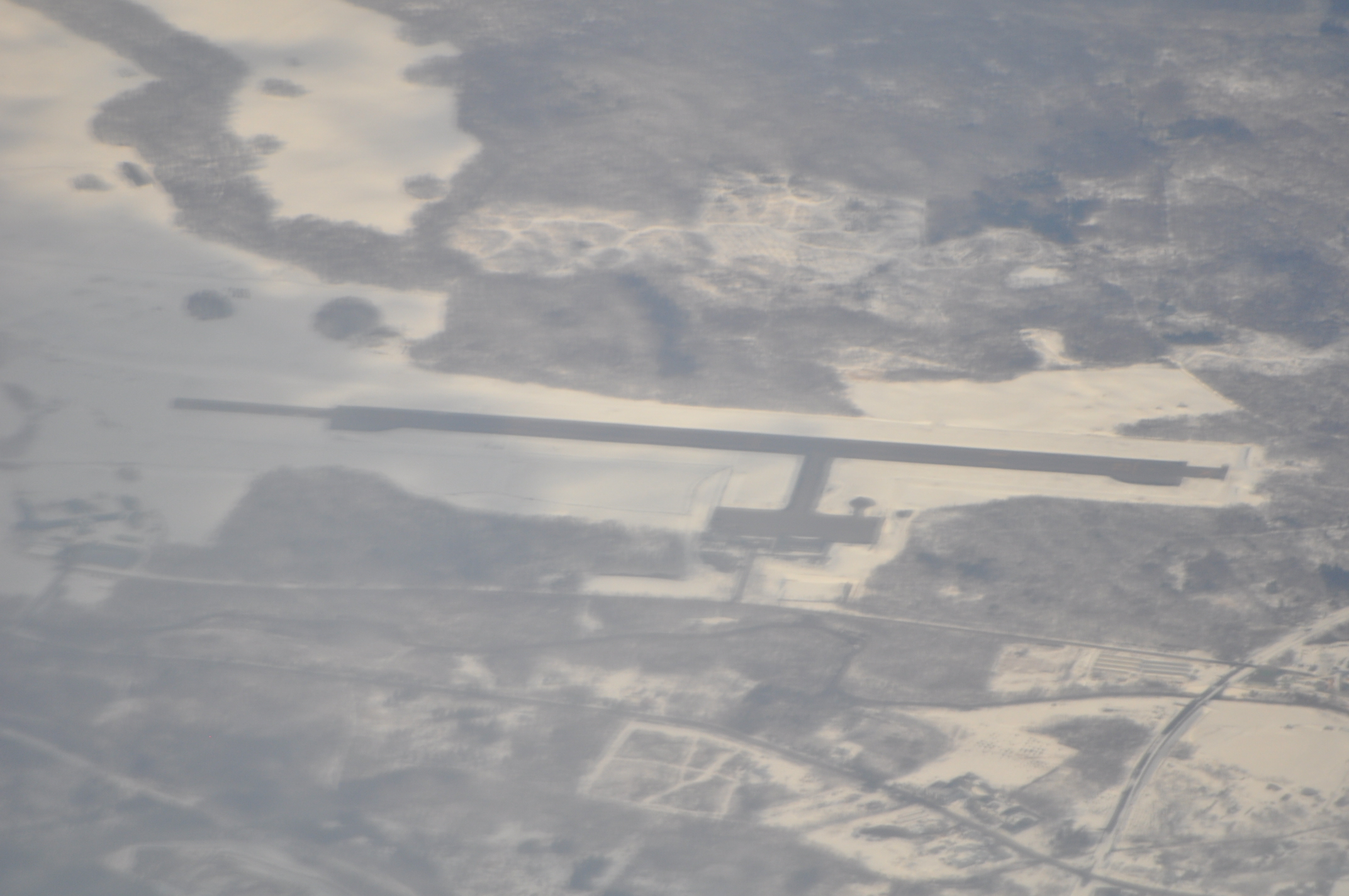 鹿部飛行場（空撮）